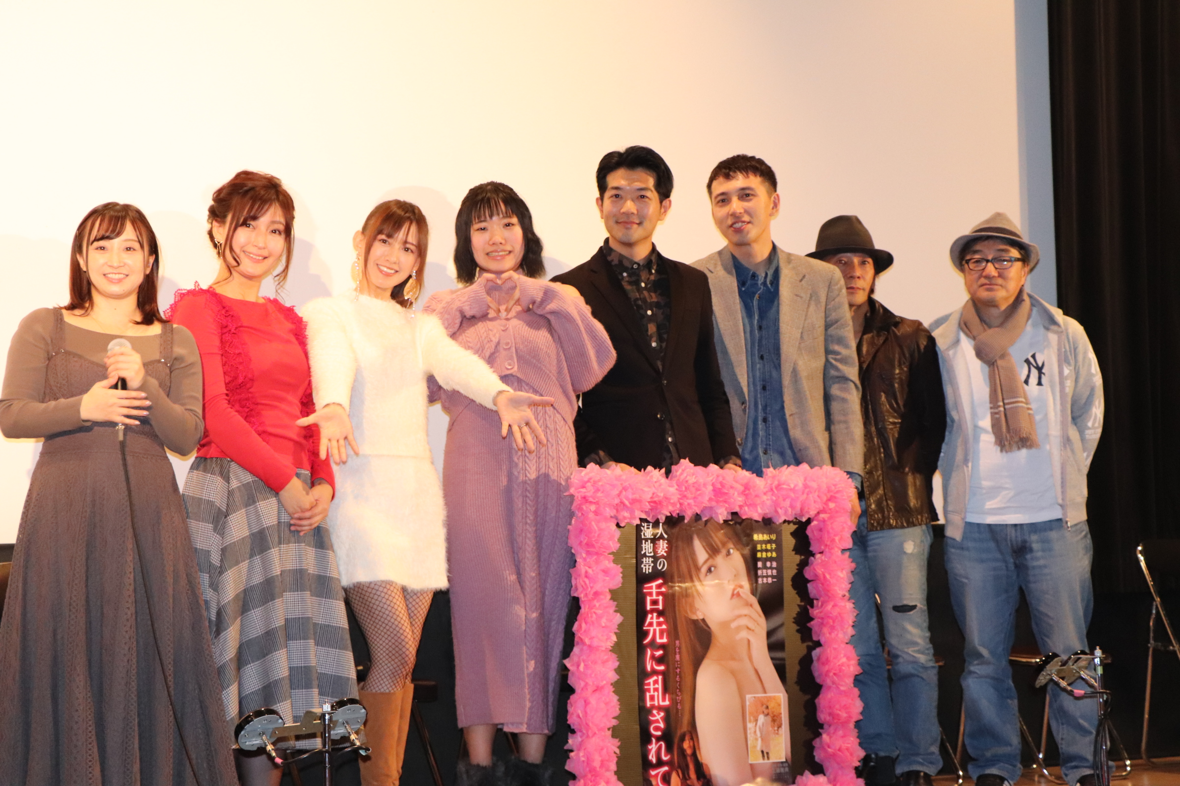 上野オークラ劇場「人妻の湿地帯 舌先に乱されて」舞台あいさつ